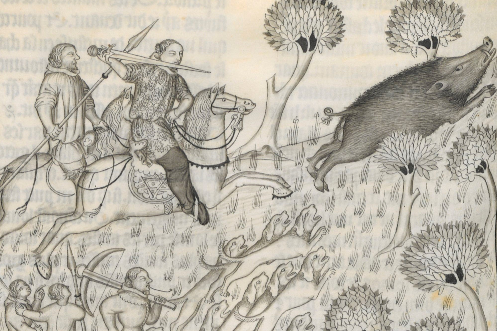 Fébus qui chasse le sanglier. Livre de la chasse, Paris, BnF, Fr. 619, fol. 83 v (Avignon, vers 1390).